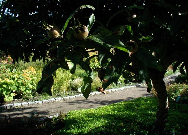 Mespilus germanica: Fruits and leaves.